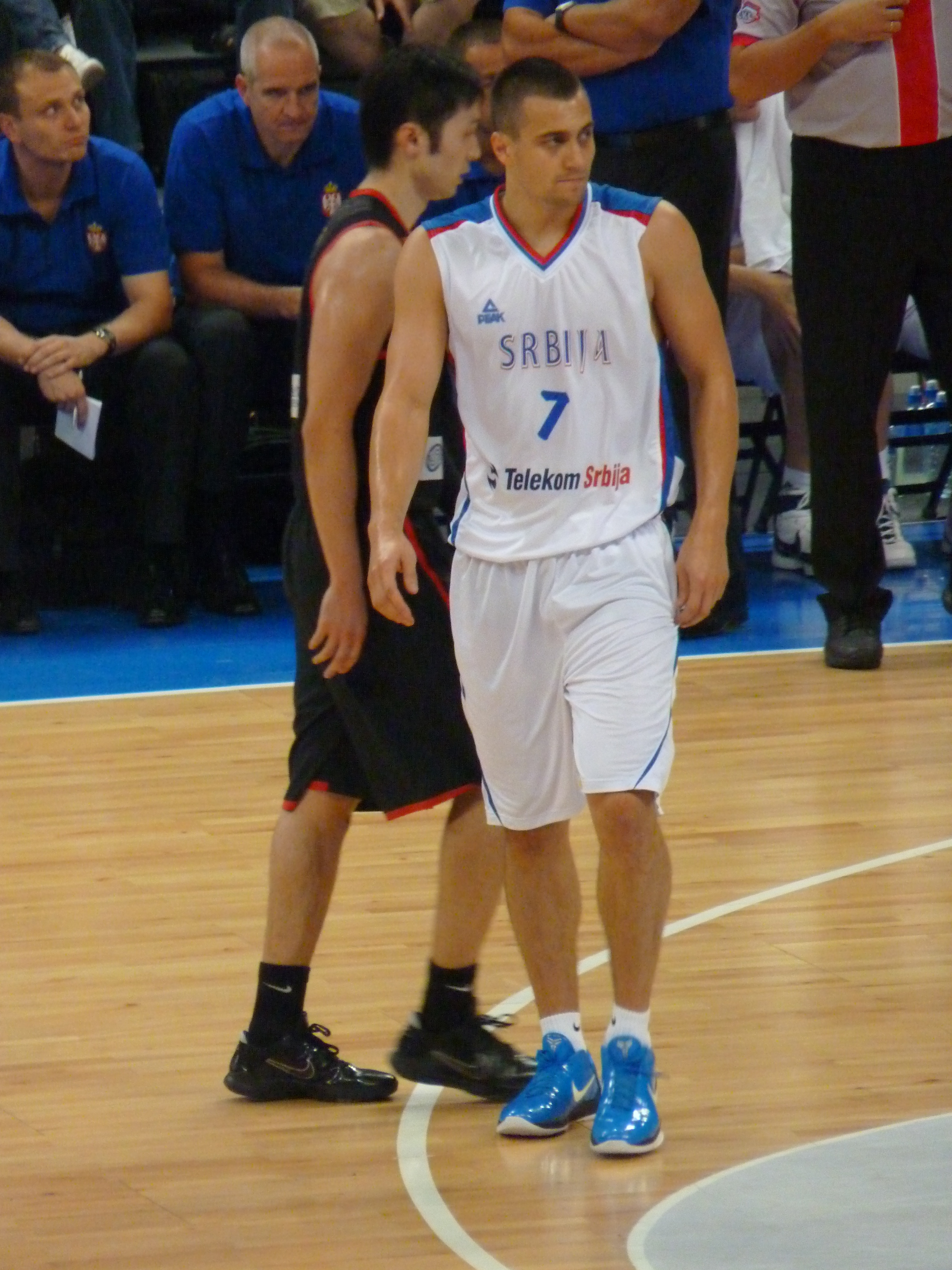 Ivan Paunić